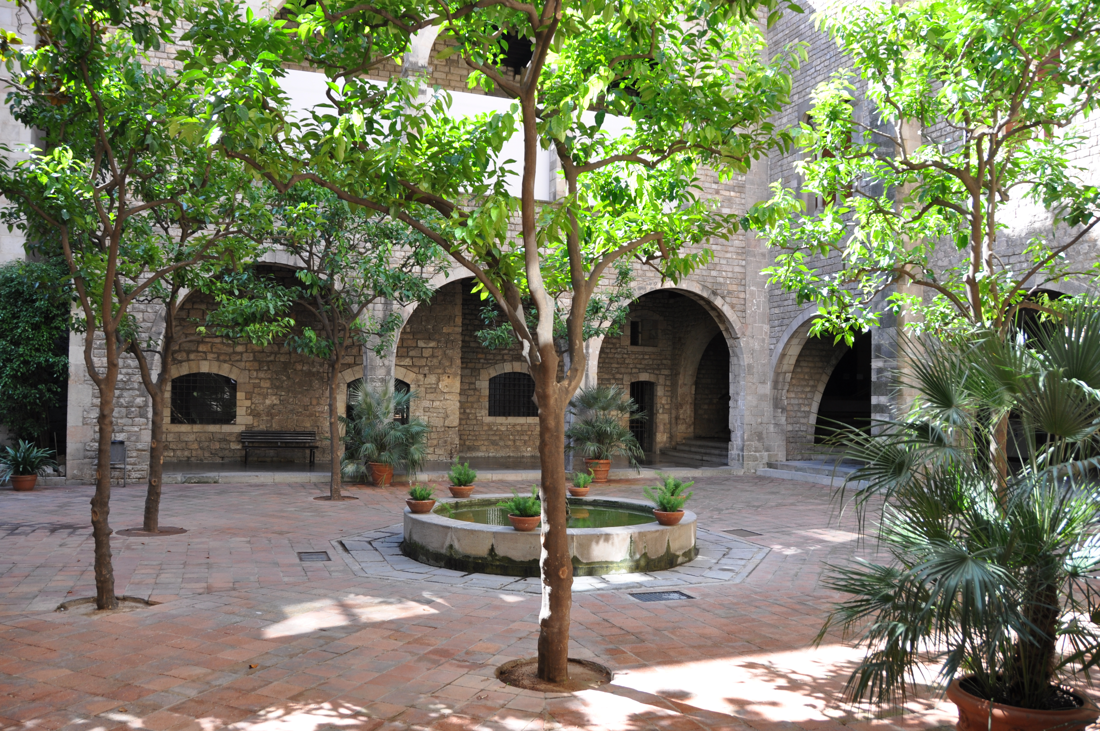 Barcelona. Museu Frederic Mares. Pati (antic verger del Palau Reial Major, reconstruït)